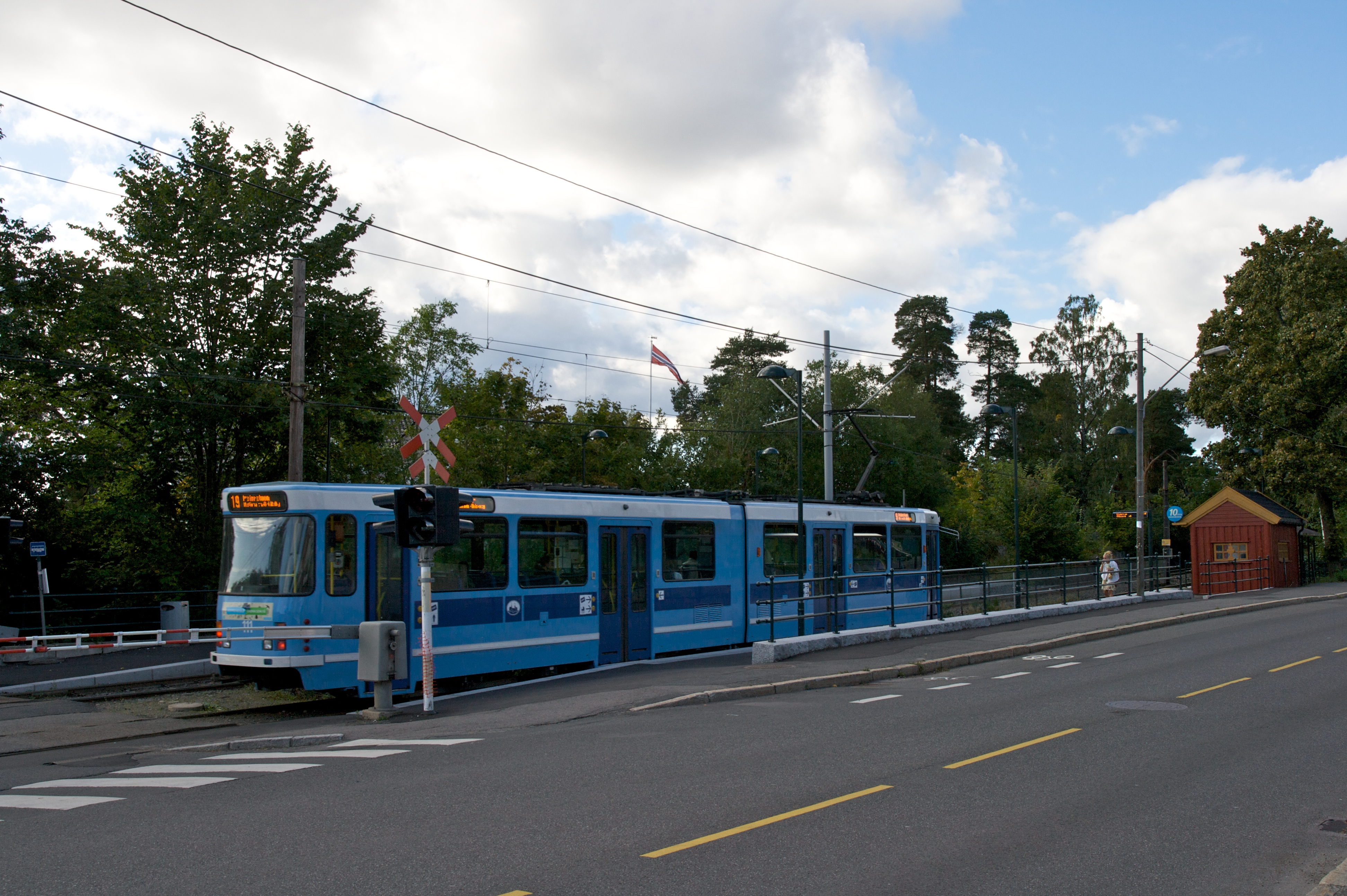 Kastellet holdeplass på Ekebergbanen.